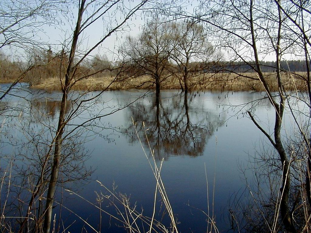 Aiviekste pie Jaunpededzes ietekas 2002-03-29